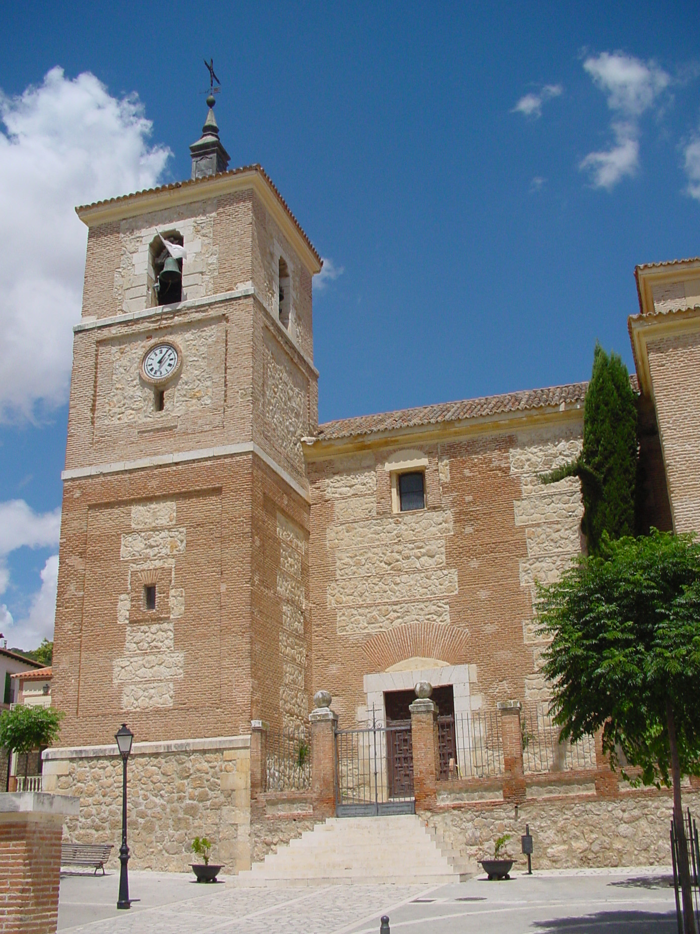 Parroquia de Santos Justos y Pastor en Tielmes.